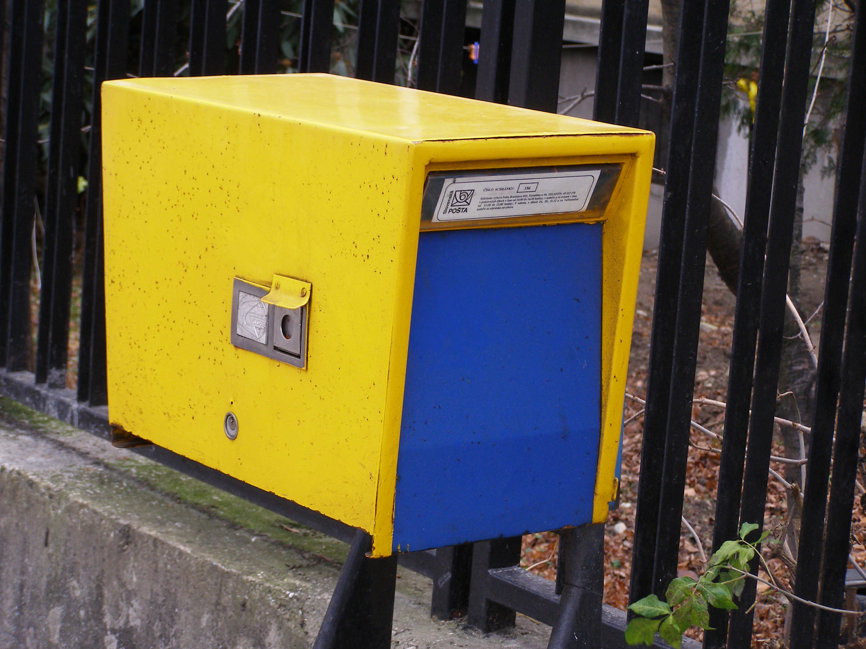 Post Box (old type), Molecova street, Karlova Ves, Bratislava, Slovakia